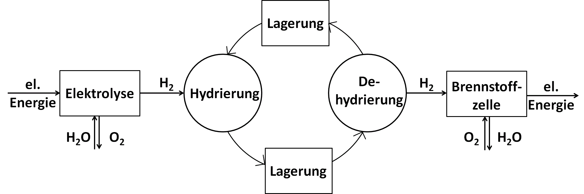 Schema einer Energiespeicherung mittels chemischer Speicherung von Wasserstoff auf einem organischen Wasserstoffträger (LOHC)